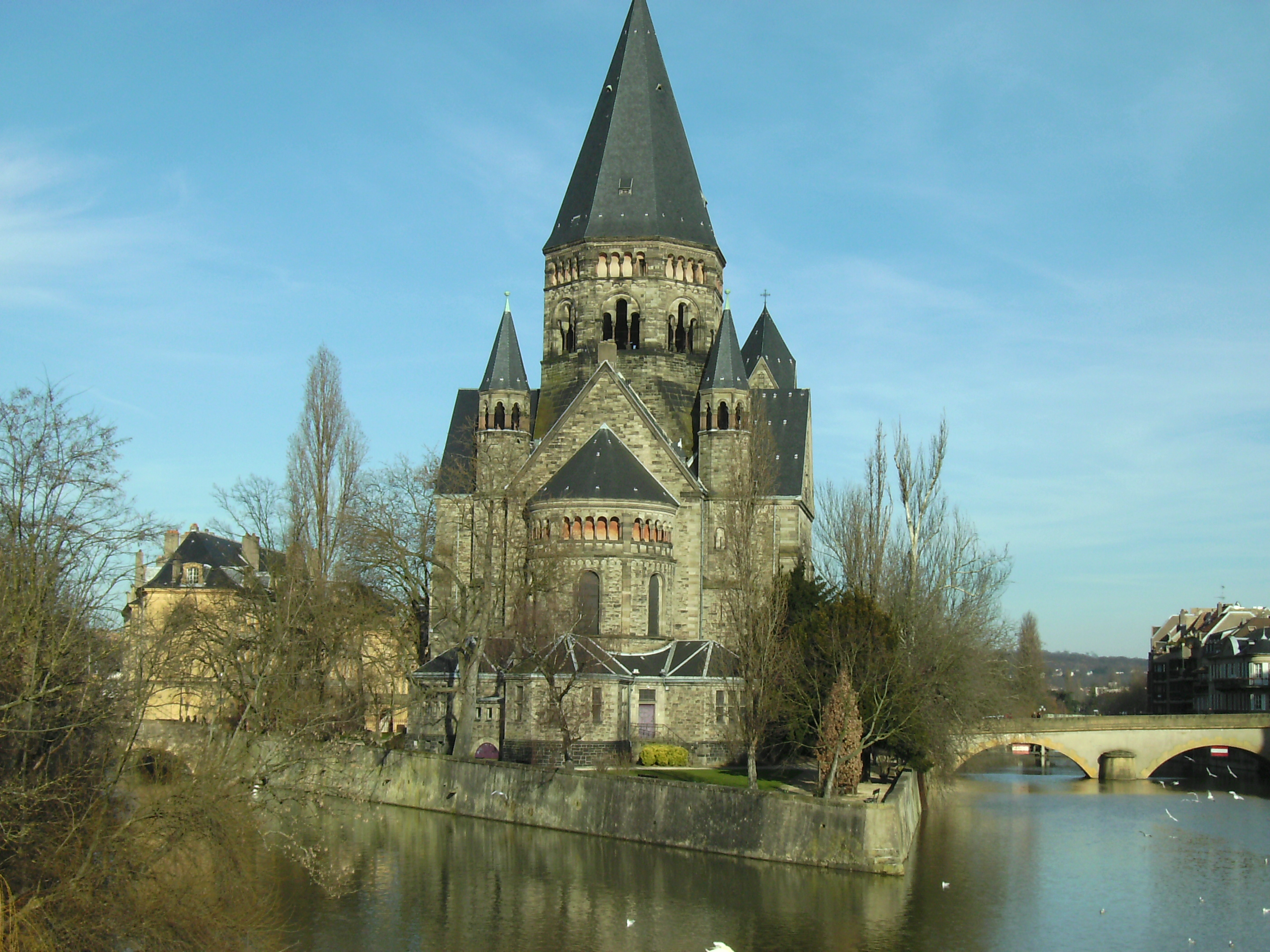 Metz: Temple Neuf auf der Moselinsel